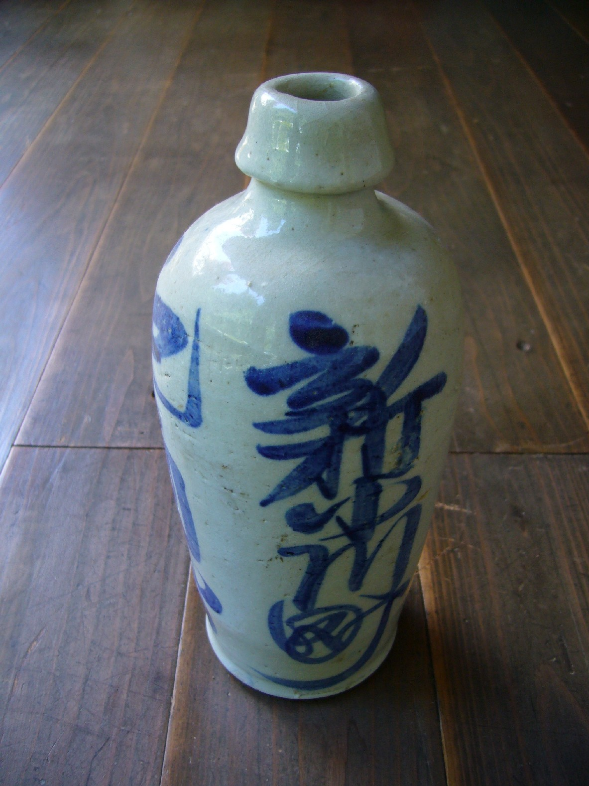 sake-bottle,binbou-tokkuri,japan